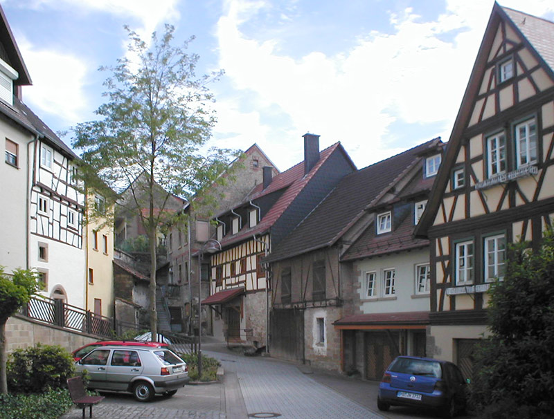 Judenviertel in Sinsheim-Hilsbach. An Stelle der halbrechts befindlichen Scheune (mit weiß umrandeten Fenster) befand sich einst die Synagoge